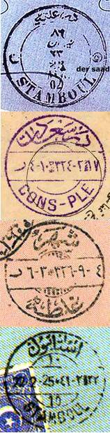 Postmarks "Istanbul" 1880-1925 درعاليه (der âliye) - STAMBOUL 1880 درعادت (der saadet) - CONS-PLE (CONSTANTINOPLE) 1908 şehir - Galata 1910 استنبول (İstanbul) - STAMBOUL 1925